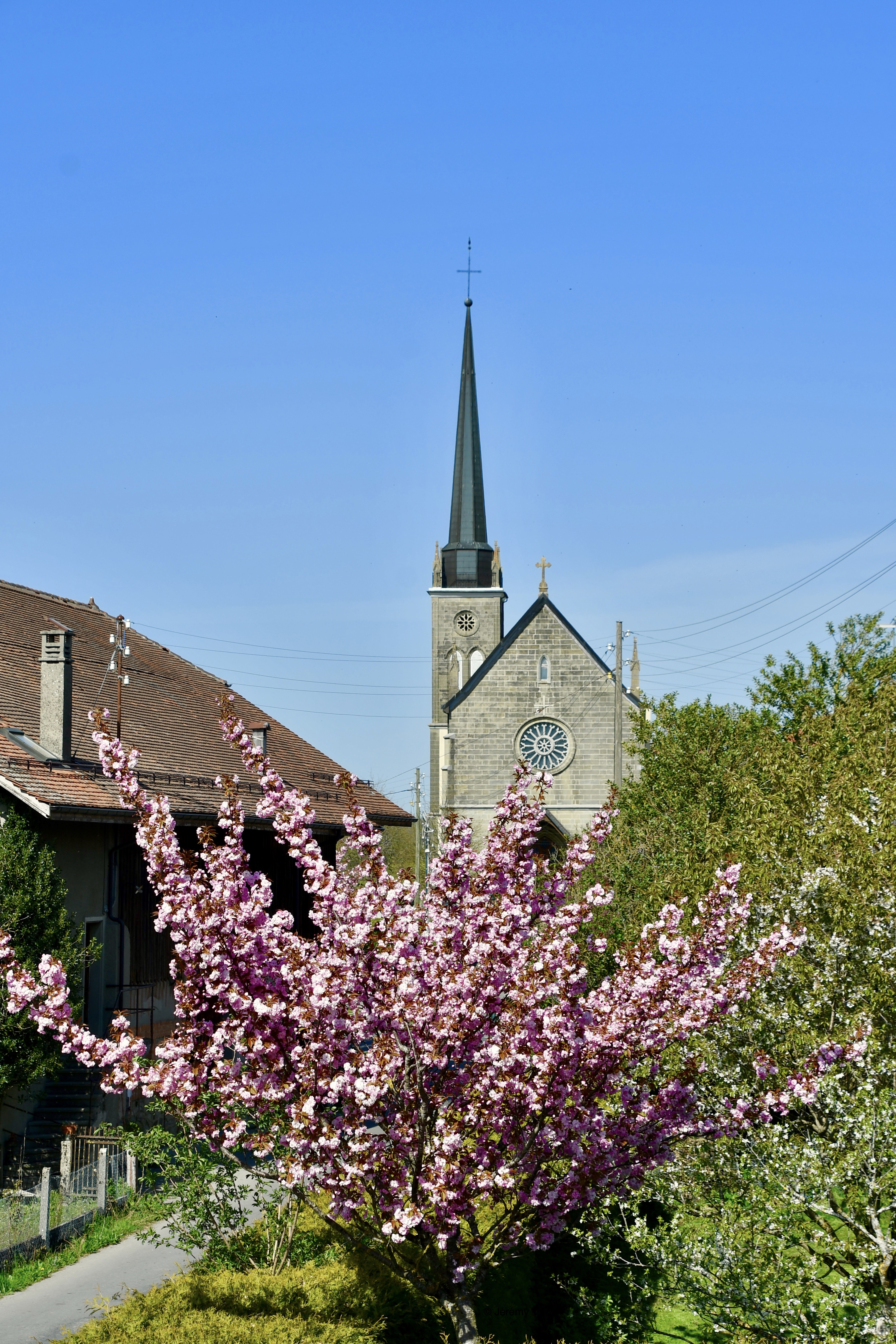 L'église catholique Saint-Étienne à Bottens (VD), en Suisse.